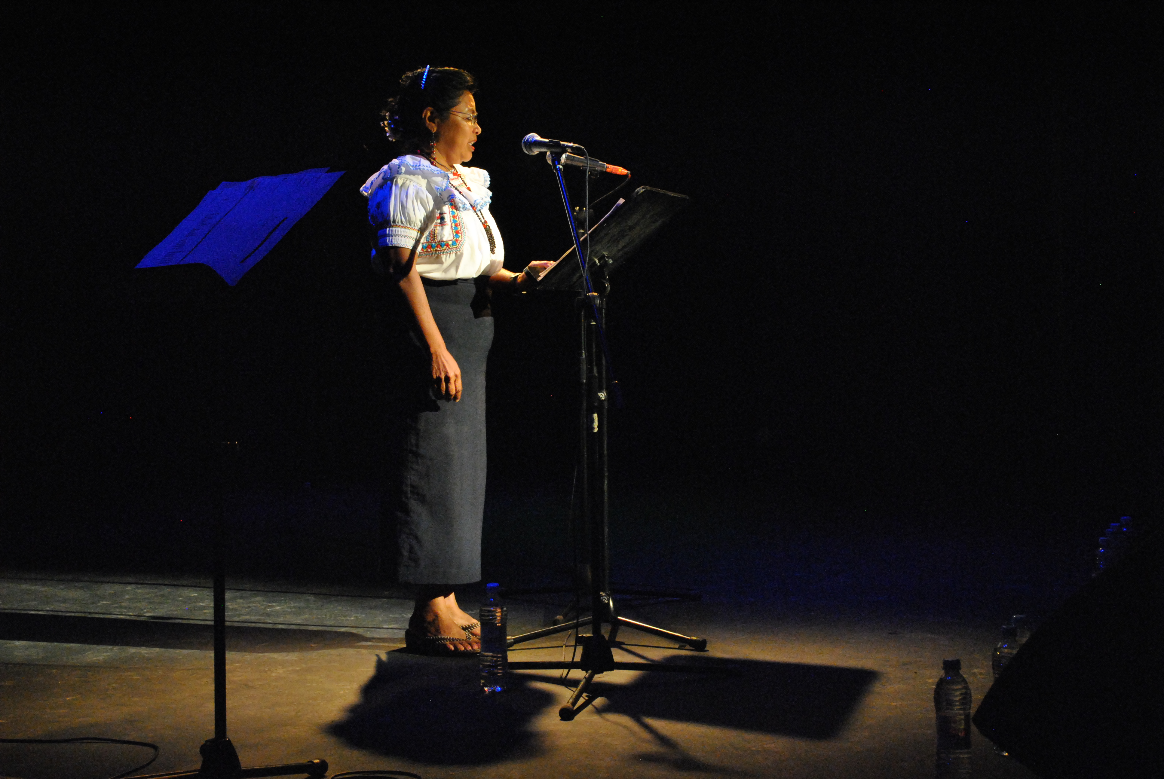 La poetisa tojolabal Roselia Jiménez en el ciclo "Poesía en Voz Alta".